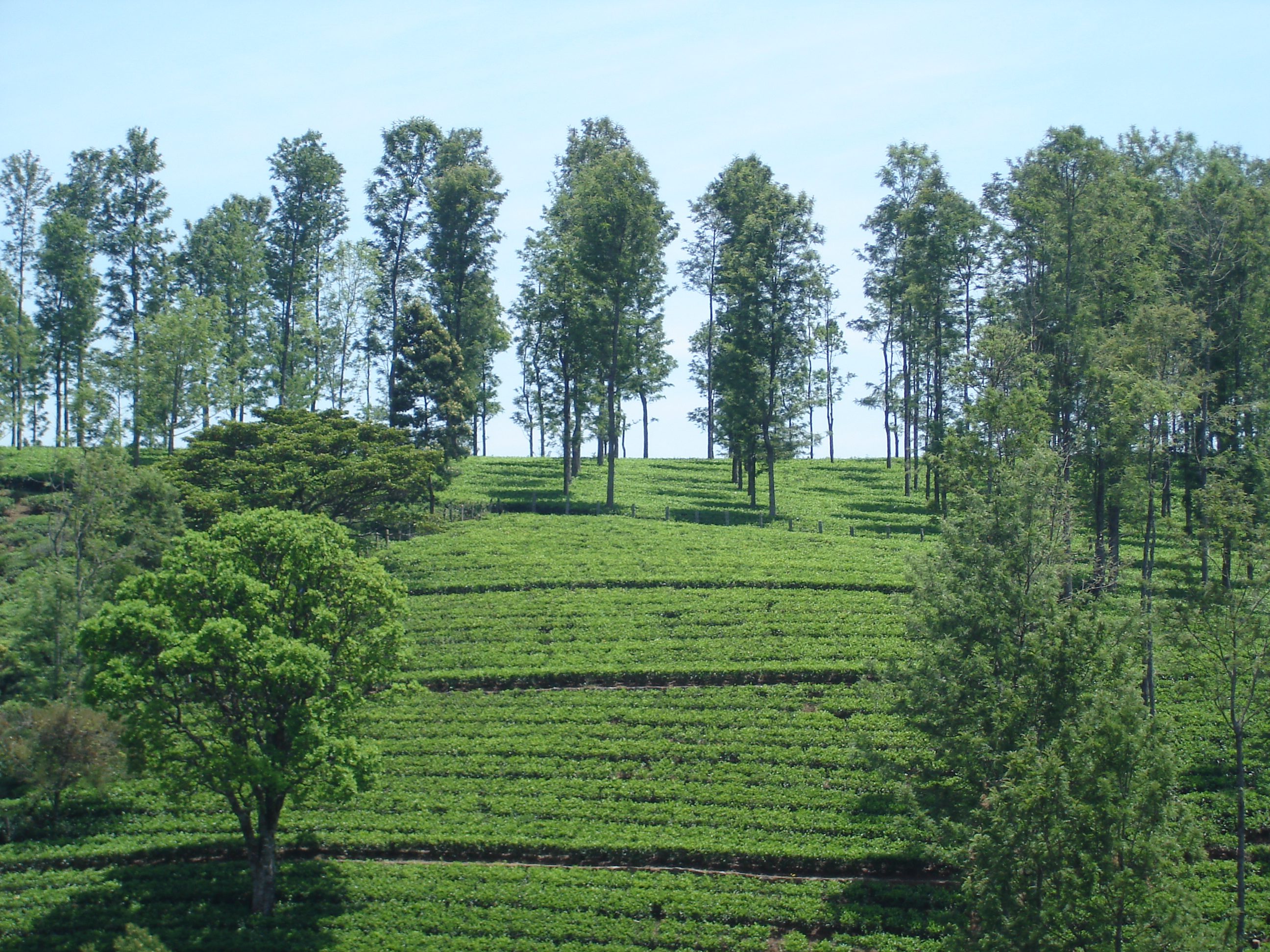 tea garden,kotagiri,tamilnadu